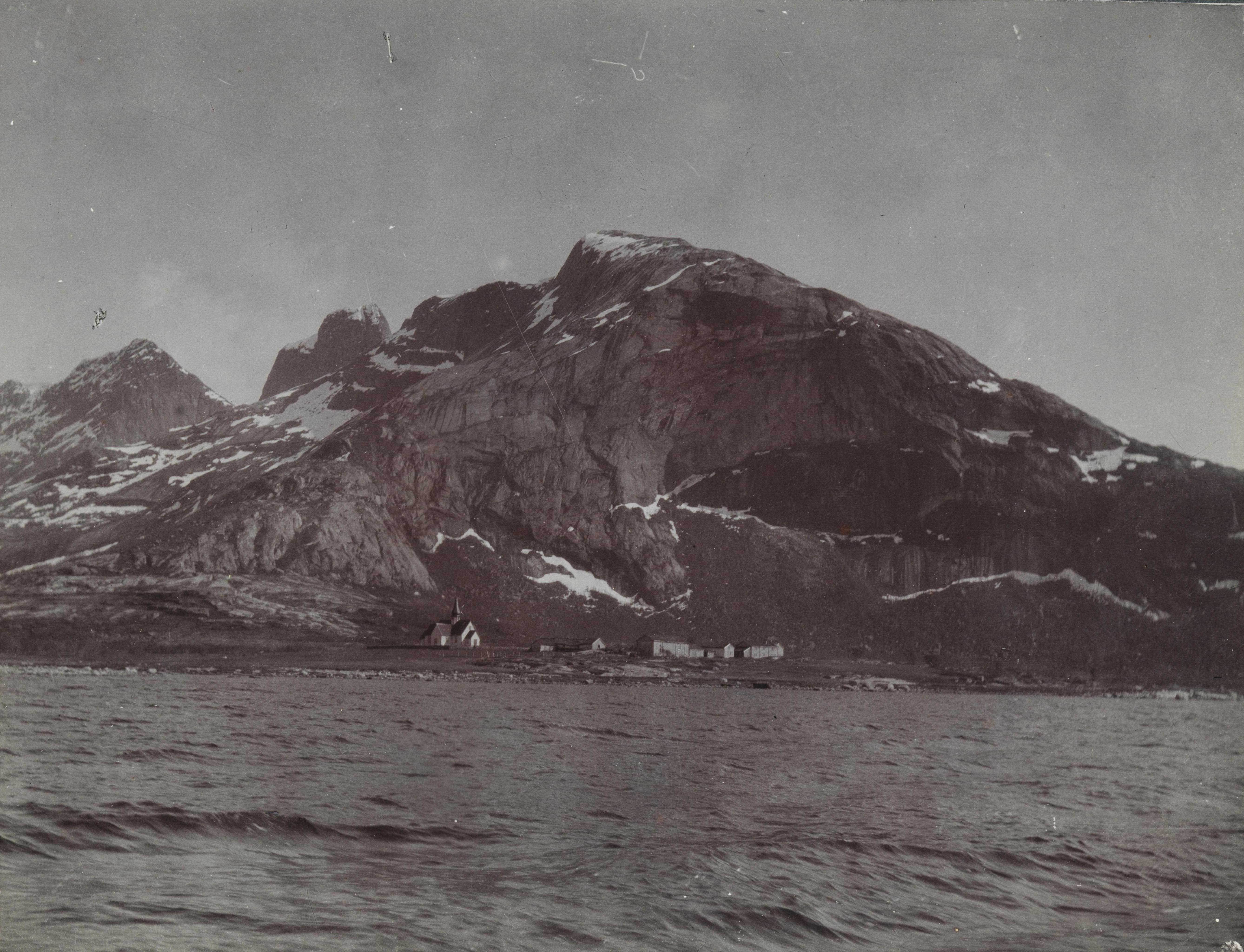 Bildet er hentet fra Nasjonalbibliotekets bildesamling Rørstad, Sørfold, Nordland